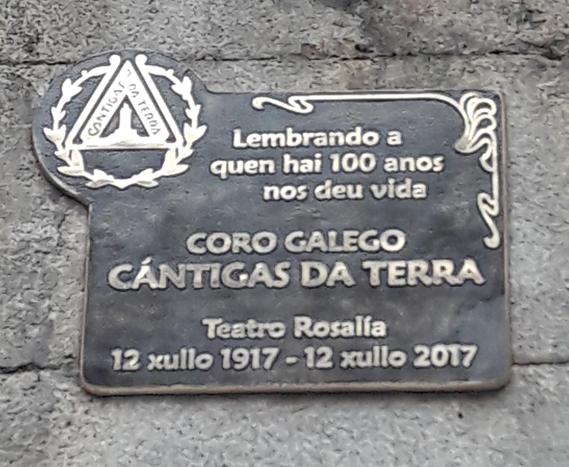 Placa en homenaxe ao centenario do coro Cántigas da Terra no teatro Rosalía de Castro da Coruña